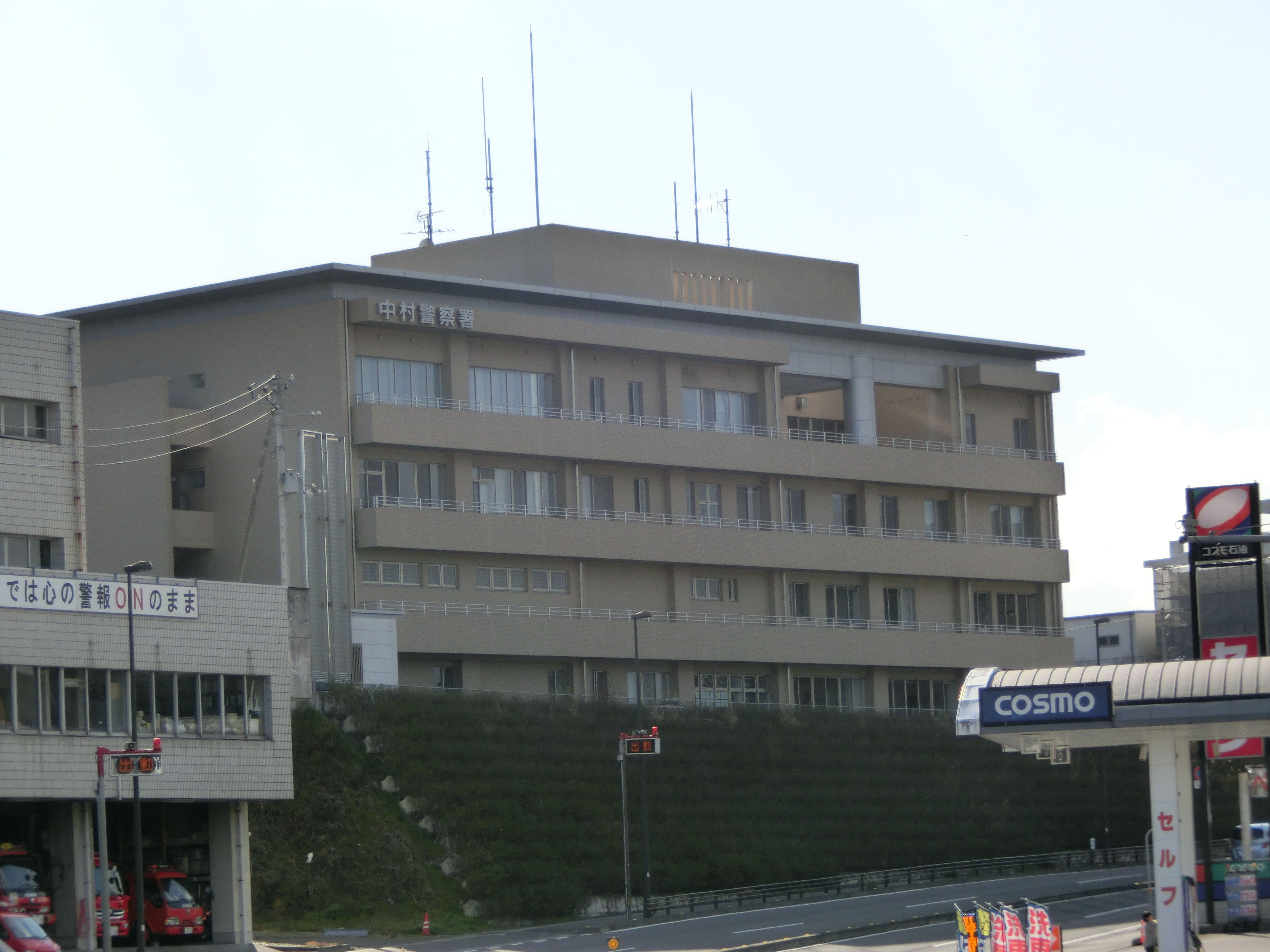 高知県警察中村警察署